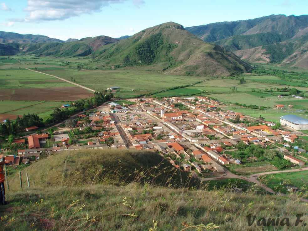 Vista del pueblo de Postrervalle